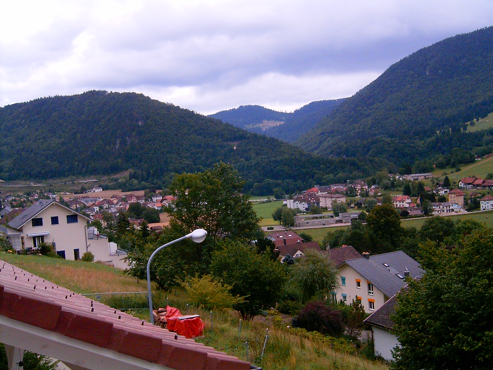 Village de Sonceboz (Suisse)